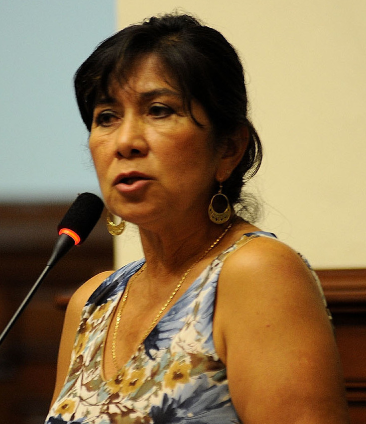 La parlamentaria Martha Chávez Cossío, durante la sesión vespertina efectuada por el Pleno, en el cual fijó su posición respecto a uno de los temas en debate.